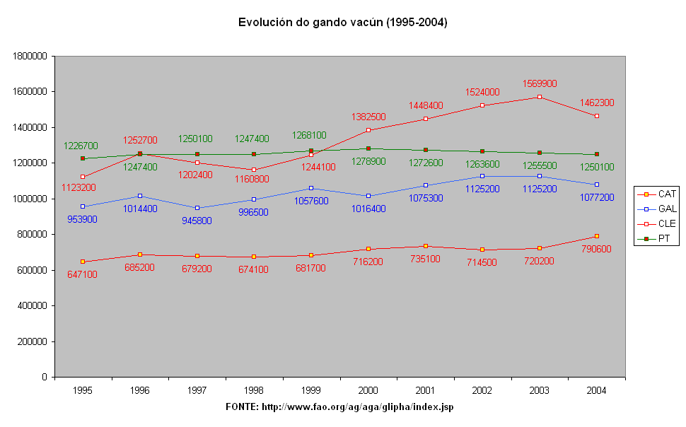 Evolución do gando vacún. Período: 1995 - 2004